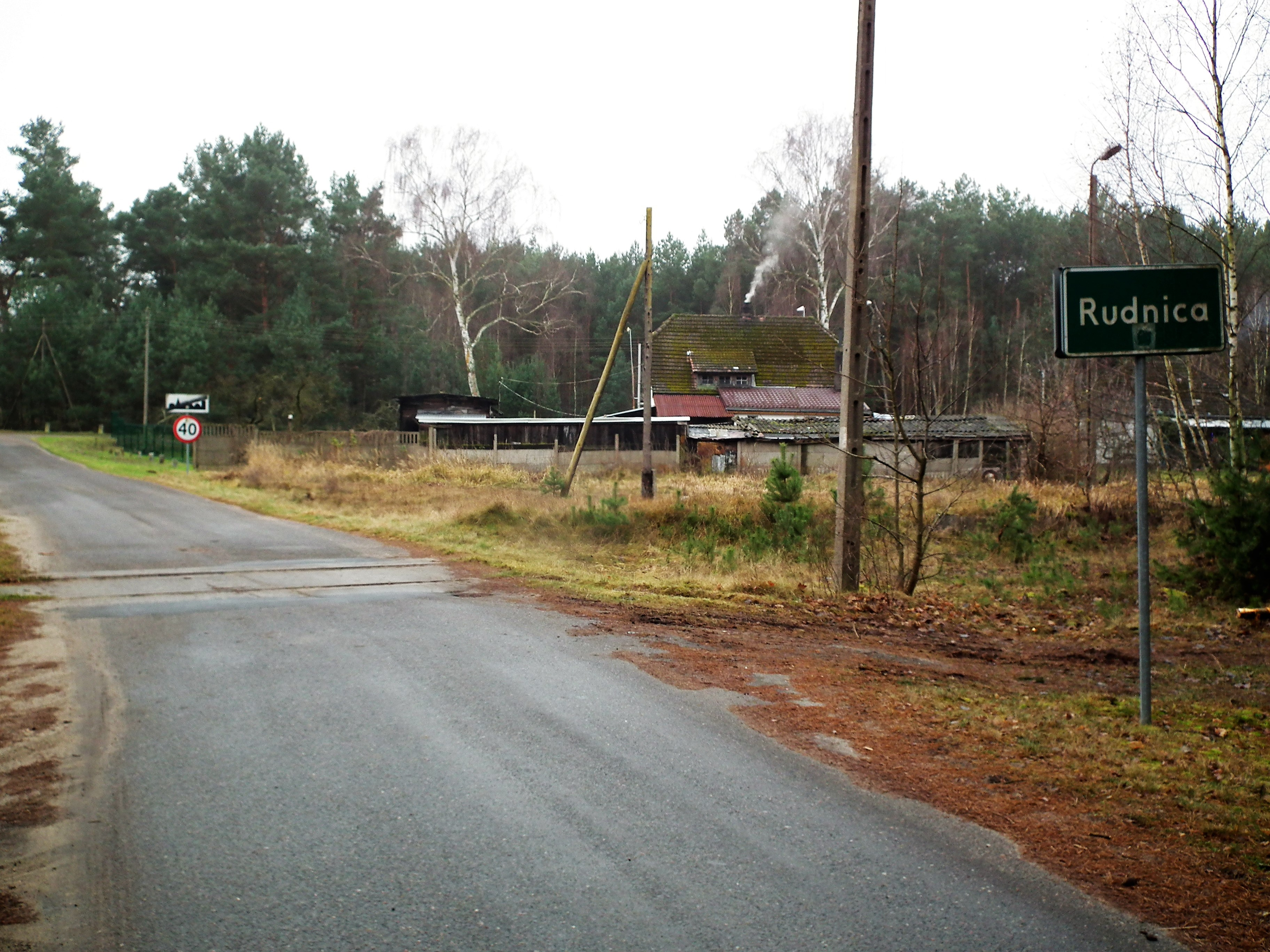 Część stacji kolejowej Rudnica - w kierunku Kniazina.